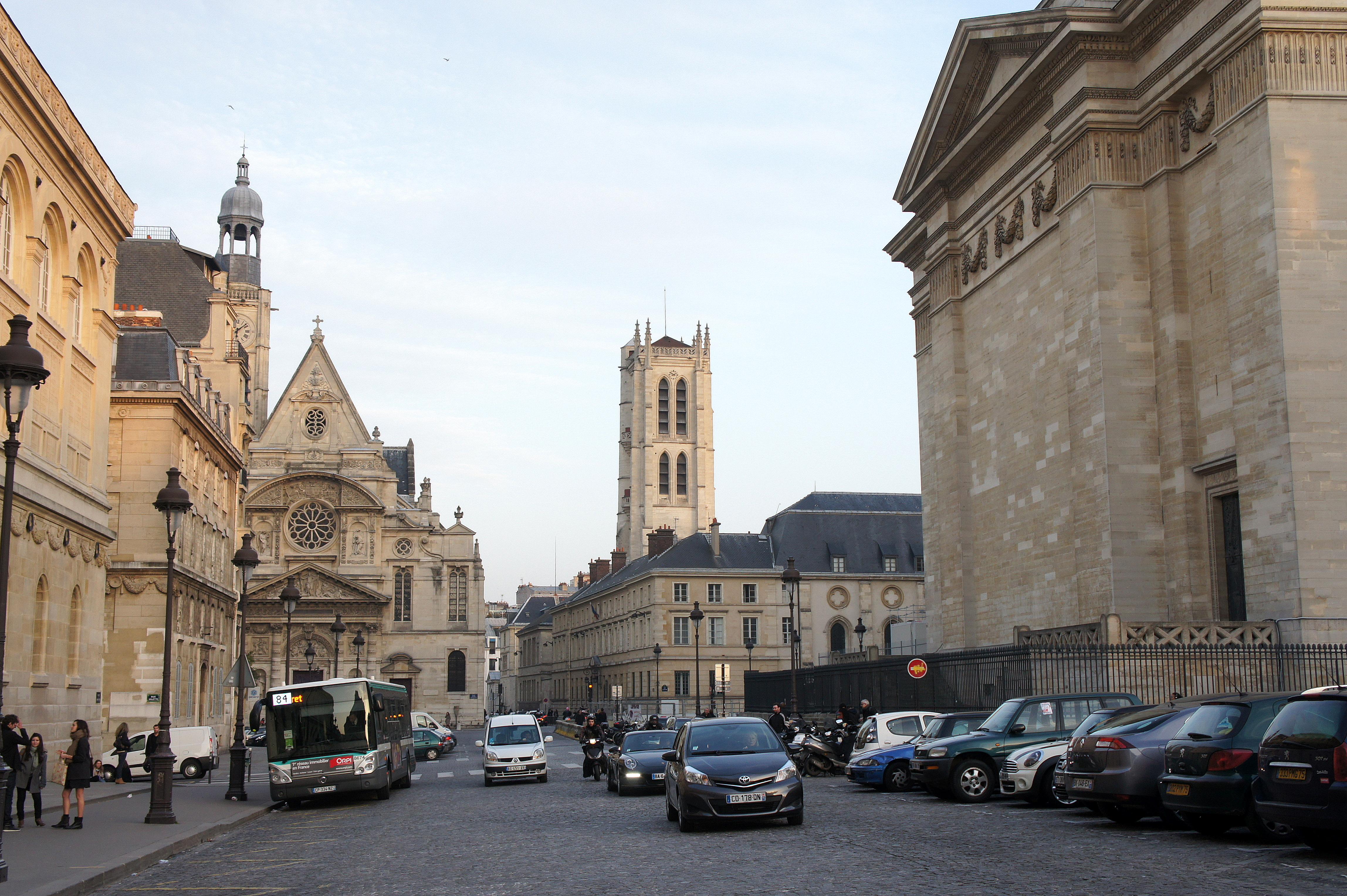 Paris V